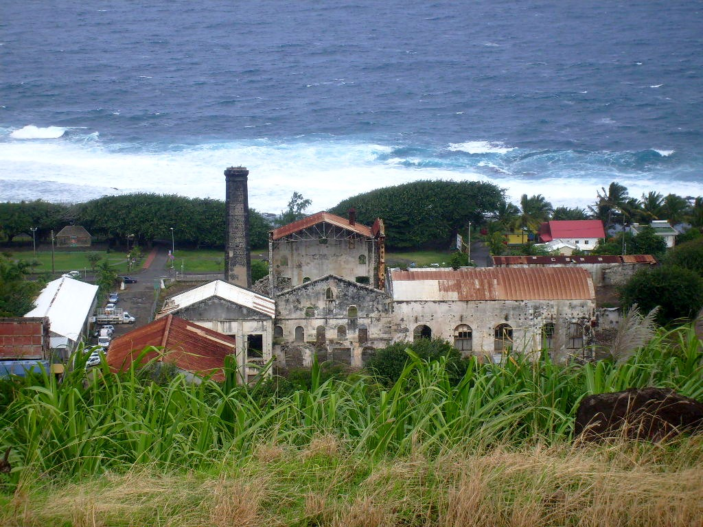 Ancienne usine de Grands Bois qui sera réhabilitée et qui acceuillera bientôt 50 logements de type HLM, une moyenne surface alimentaire ainsi qu'une médiathèque.